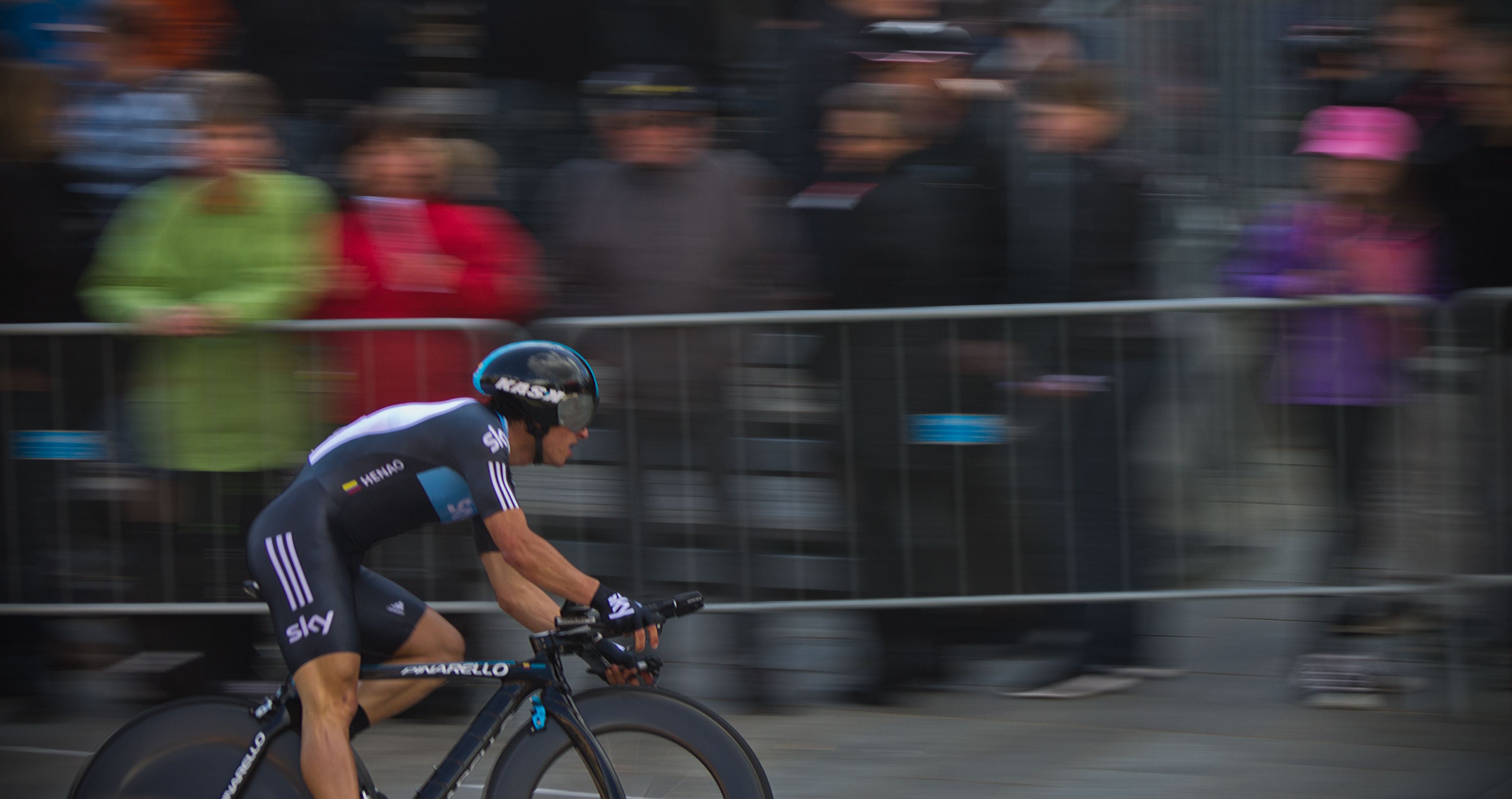 HENAO MONTOYA Sergio Luis #184